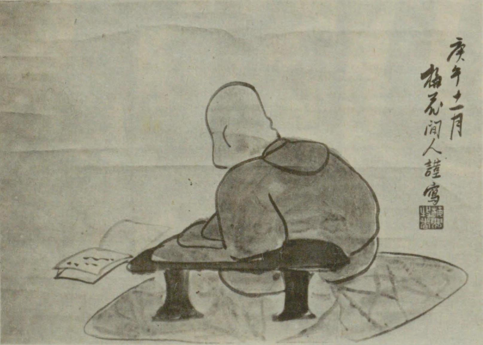 岡田梅間筆 井上士朗画像 照運寺蔵